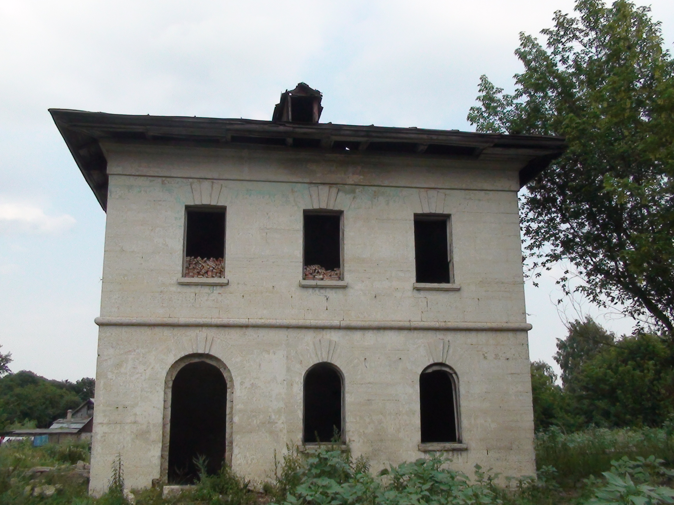 Скорняково-усадьба